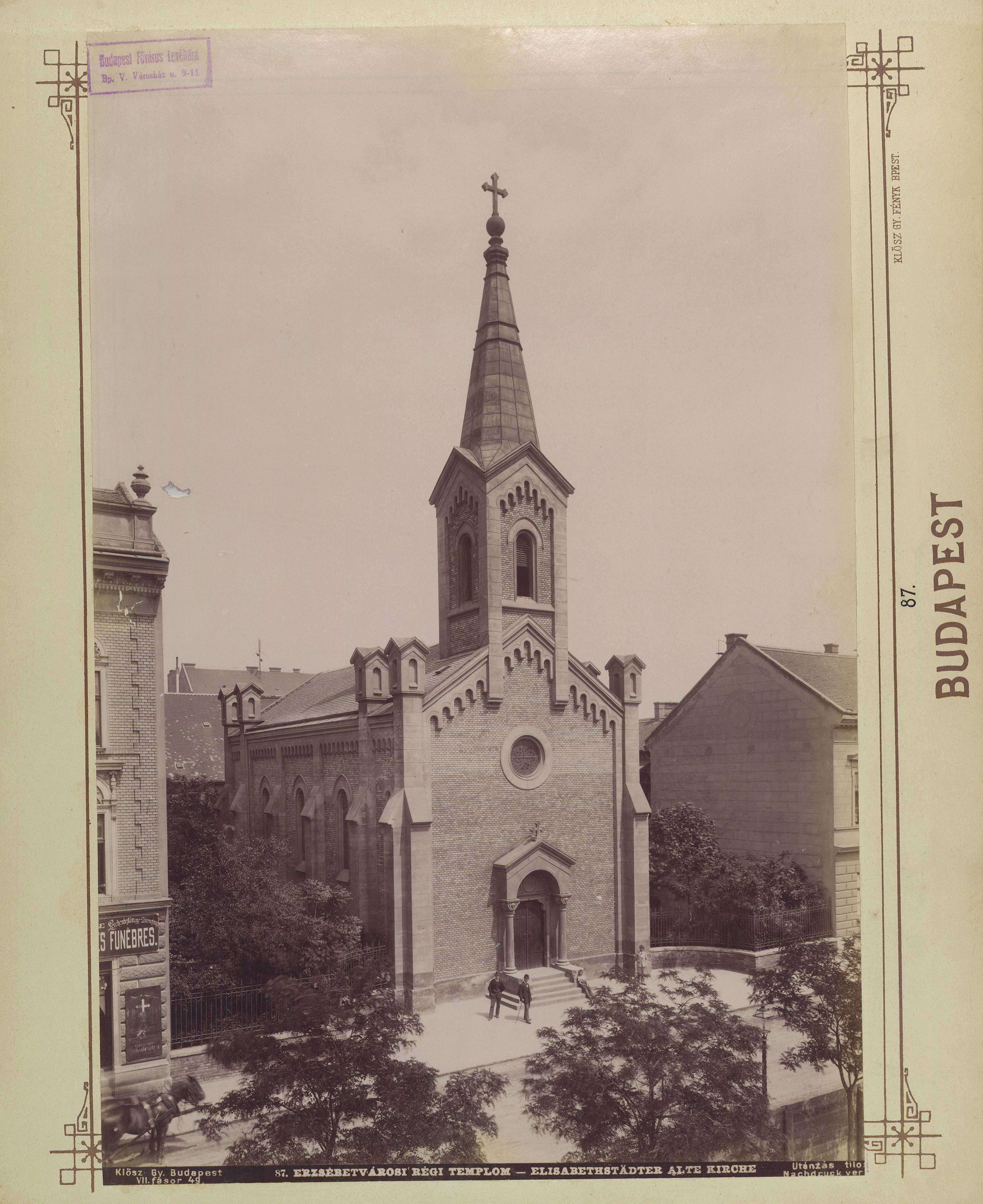 Rózsák tere, római katolikus (ma görögkatolikus) templom. A felvétel 1894 körül készült. A kép forrását kérjük így adja meg: Fortepan / Budapest Főváros Levéltára. Levéltári jelzet: HU.BFL.XV.19.d.1.07.088 Location: Hungary, Budapest VII. Tags: church